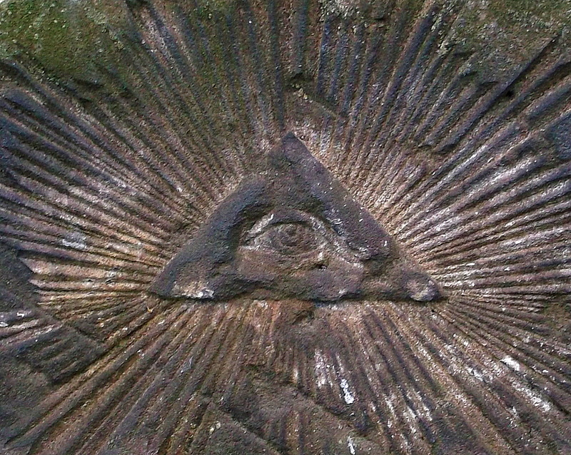 Kamienna Góra, cmentarz żydowski, 1 poł. XIX